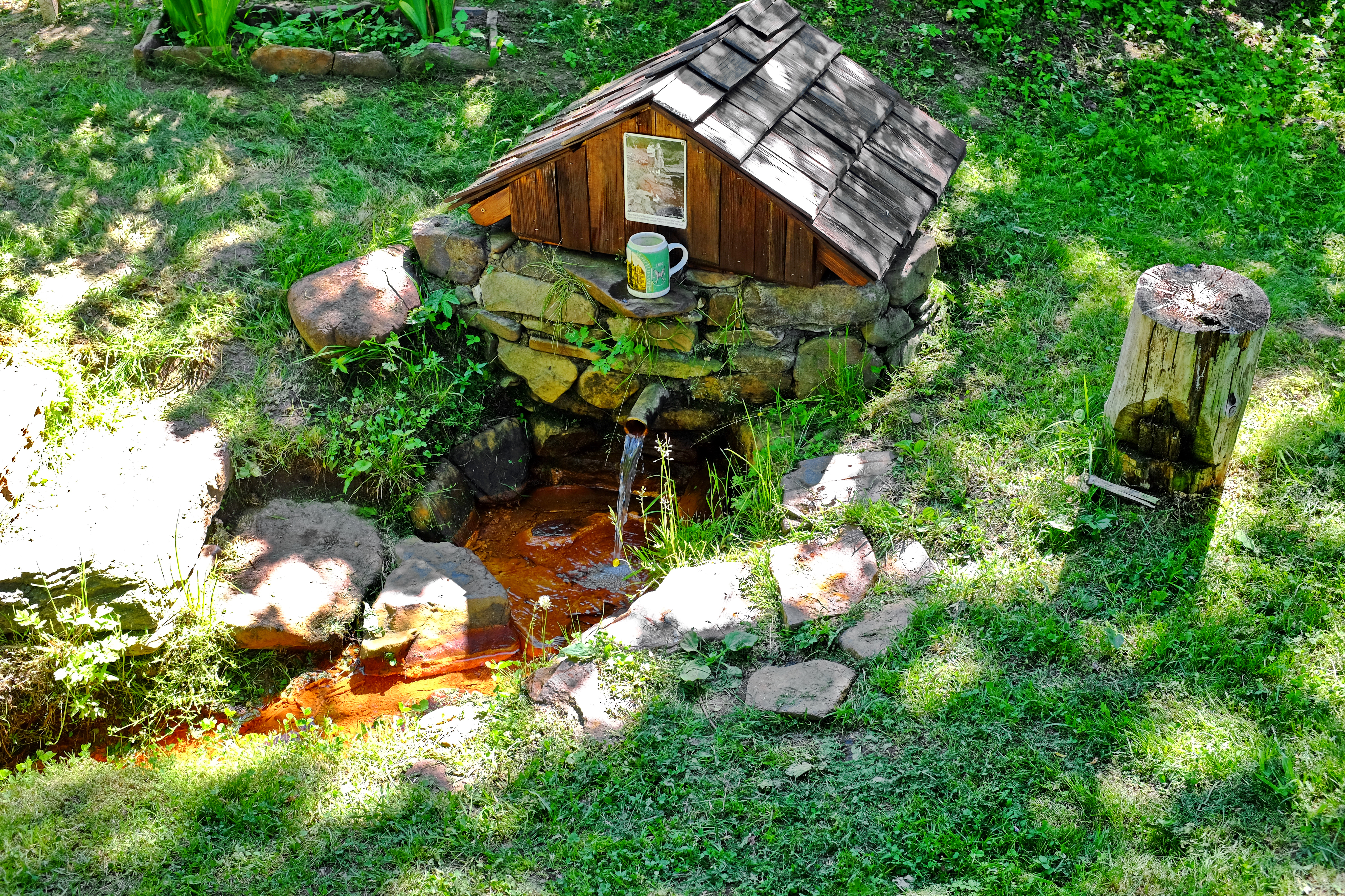 Barochův pramen, obec Prameny, Slavkovský les, okres Cheb